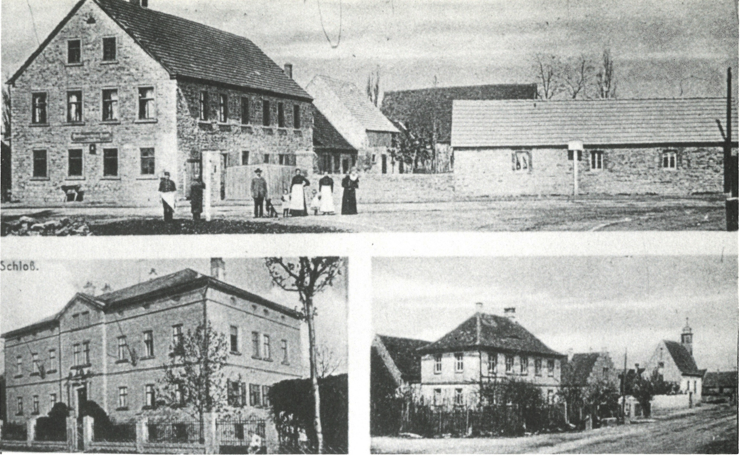 Postkarte von 1909: Düllstadt, oben die Gaststätte K. Pfannes an der Bamberger Straße, links das Schloss Düllstadt und rechts der Ortskern mit (von links nach rechts) Schule, Rathaus und Michaelskirche